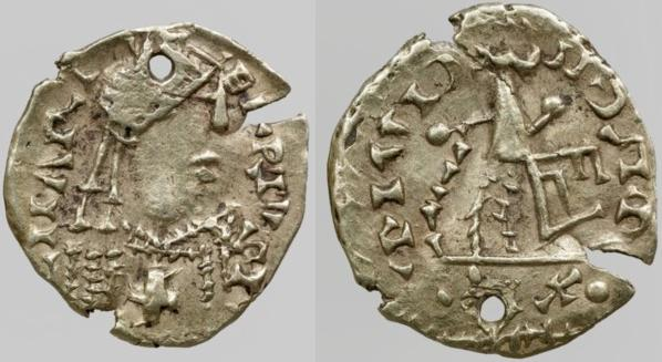 Tiers de sou de Caribert Ier frappé à Aire (561-567). BNF, monnaies, médailles et antiques. Avers : Buste diadémé, drapé et cuirassé à droite, une croix sur la poitrine. Revers : Victoire à droite tenant deux globes.